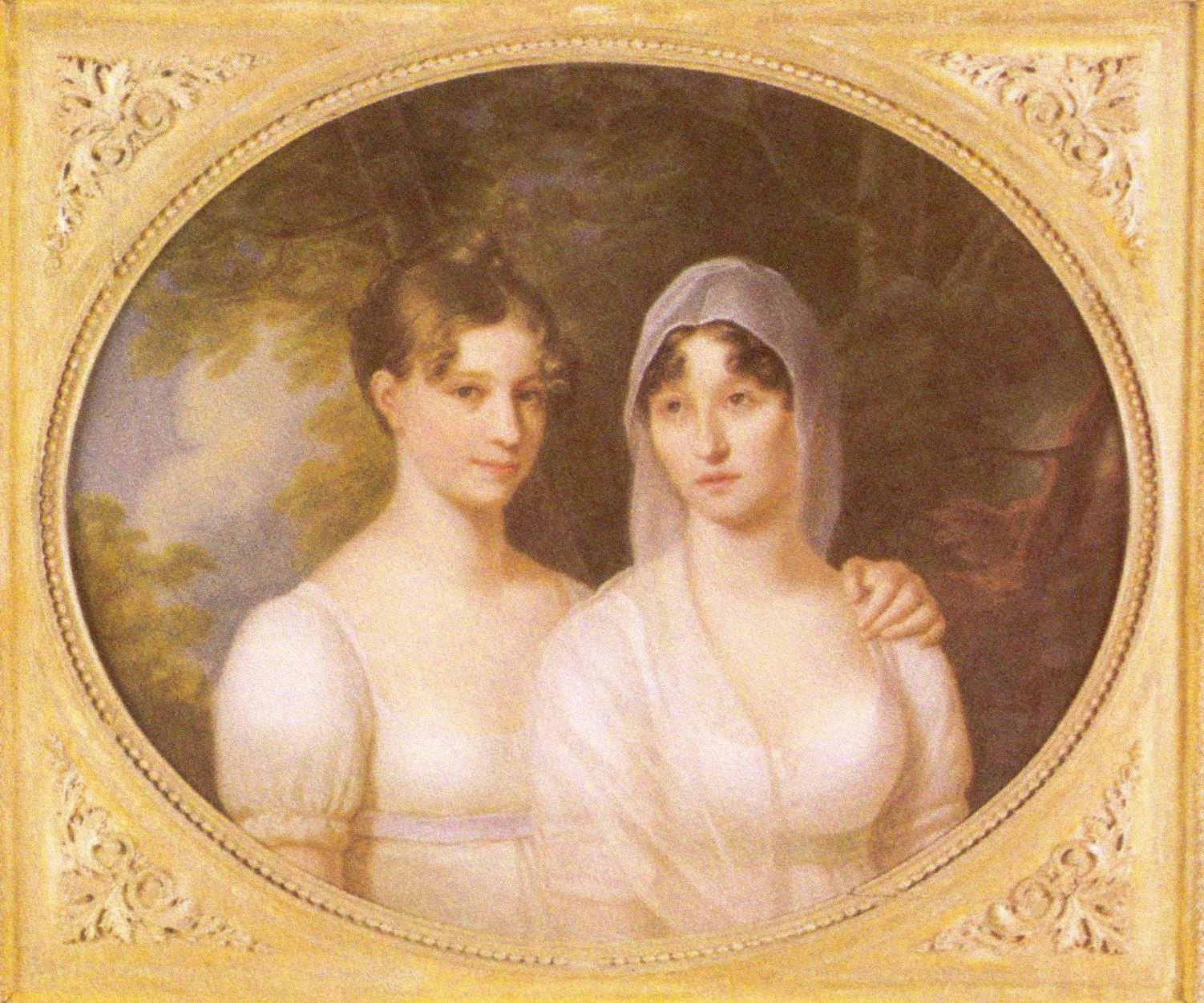 Cecylia Beydale i Maria z Dzierżanowskich Czartoryska